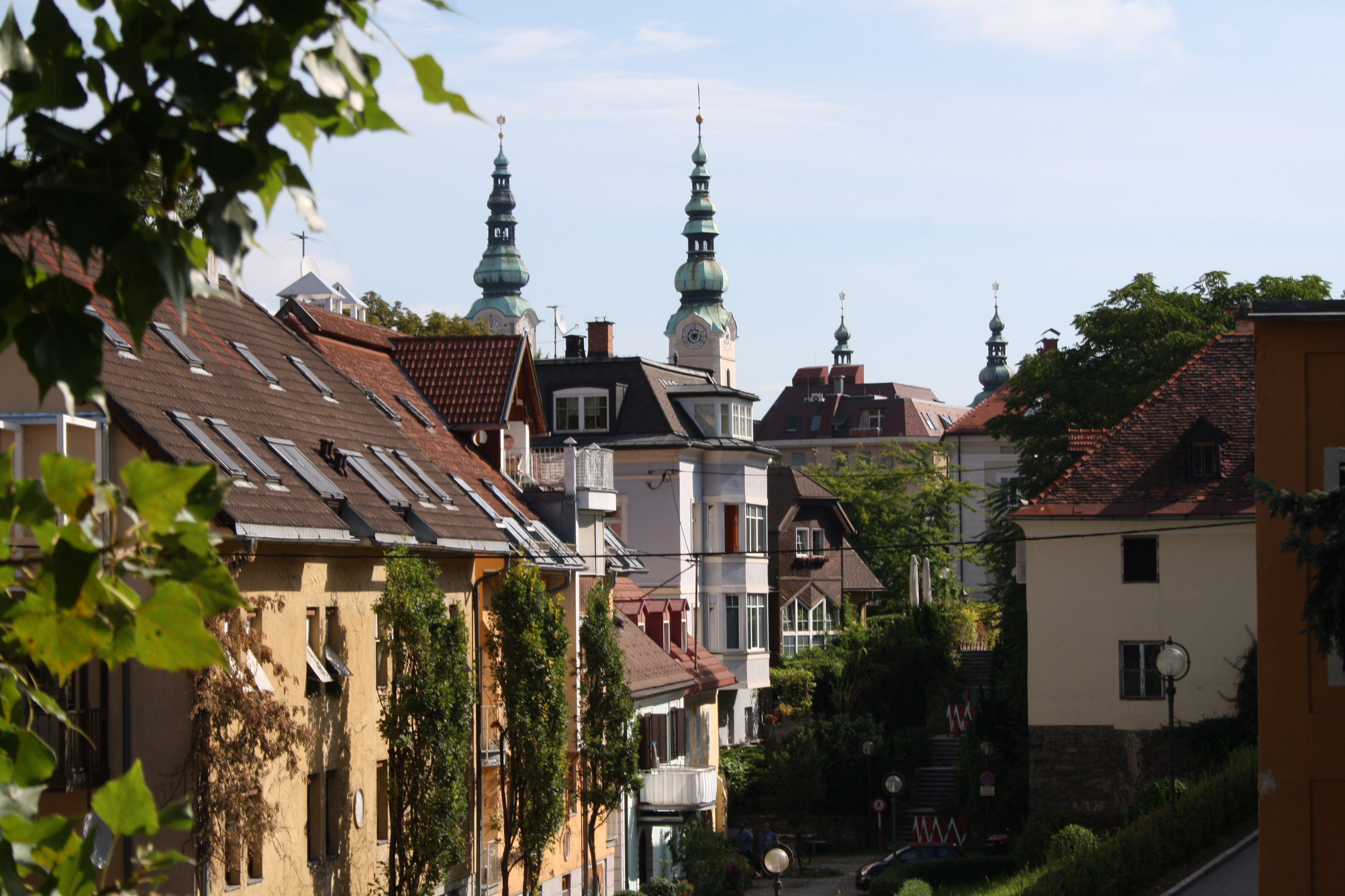 Stadthauptpfarrkirche hl. Egid